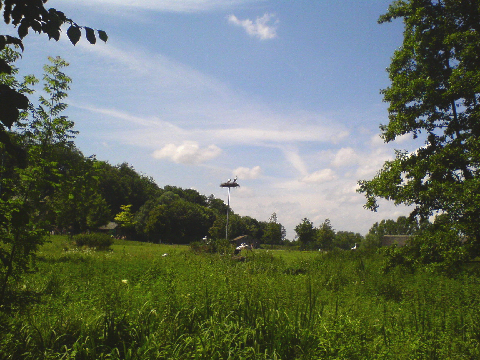 Storchenanlage im Straubinger Tiergarten